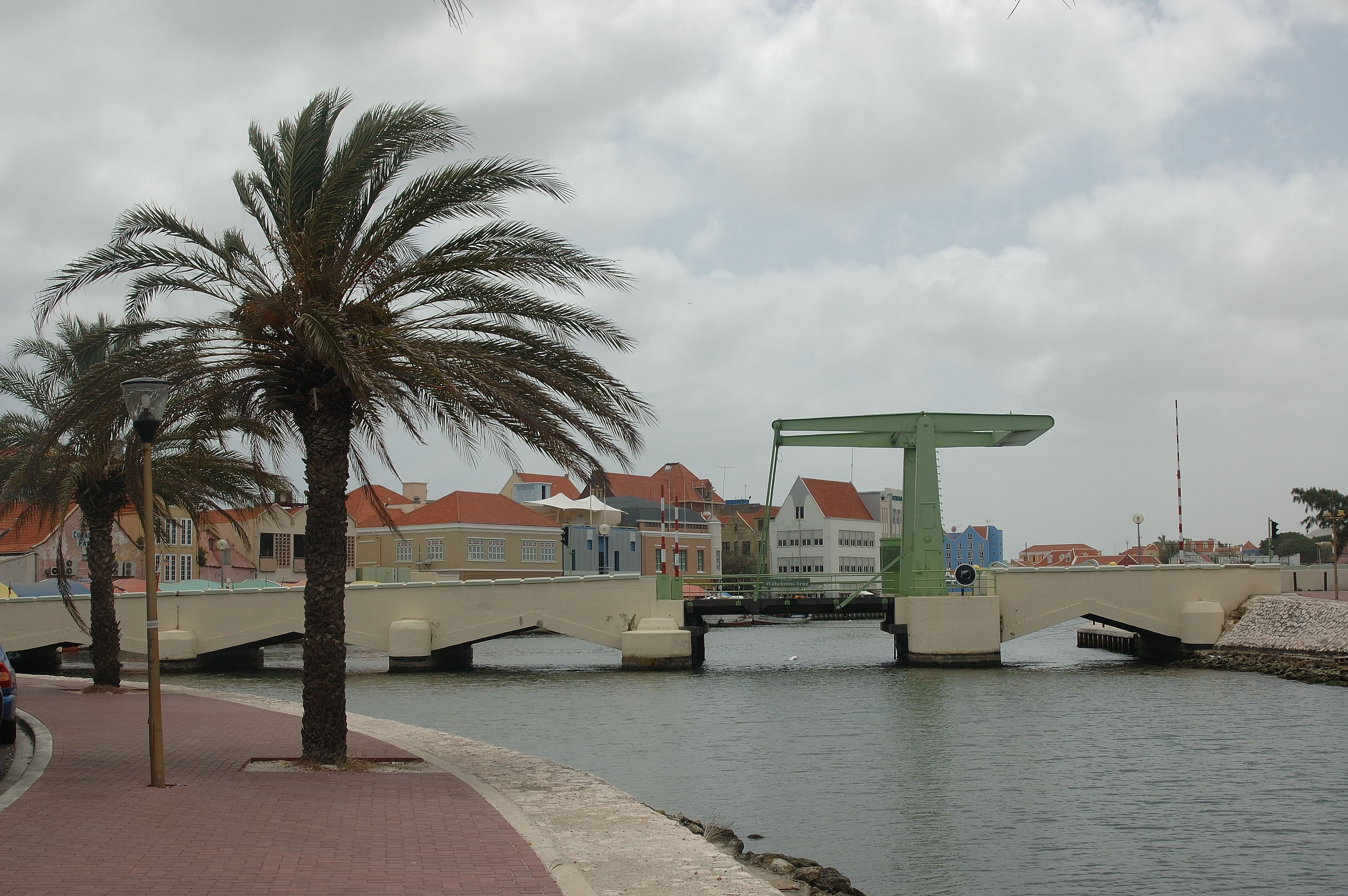 Koningin Wilhelminabrug in Willemstad (Curaçao)